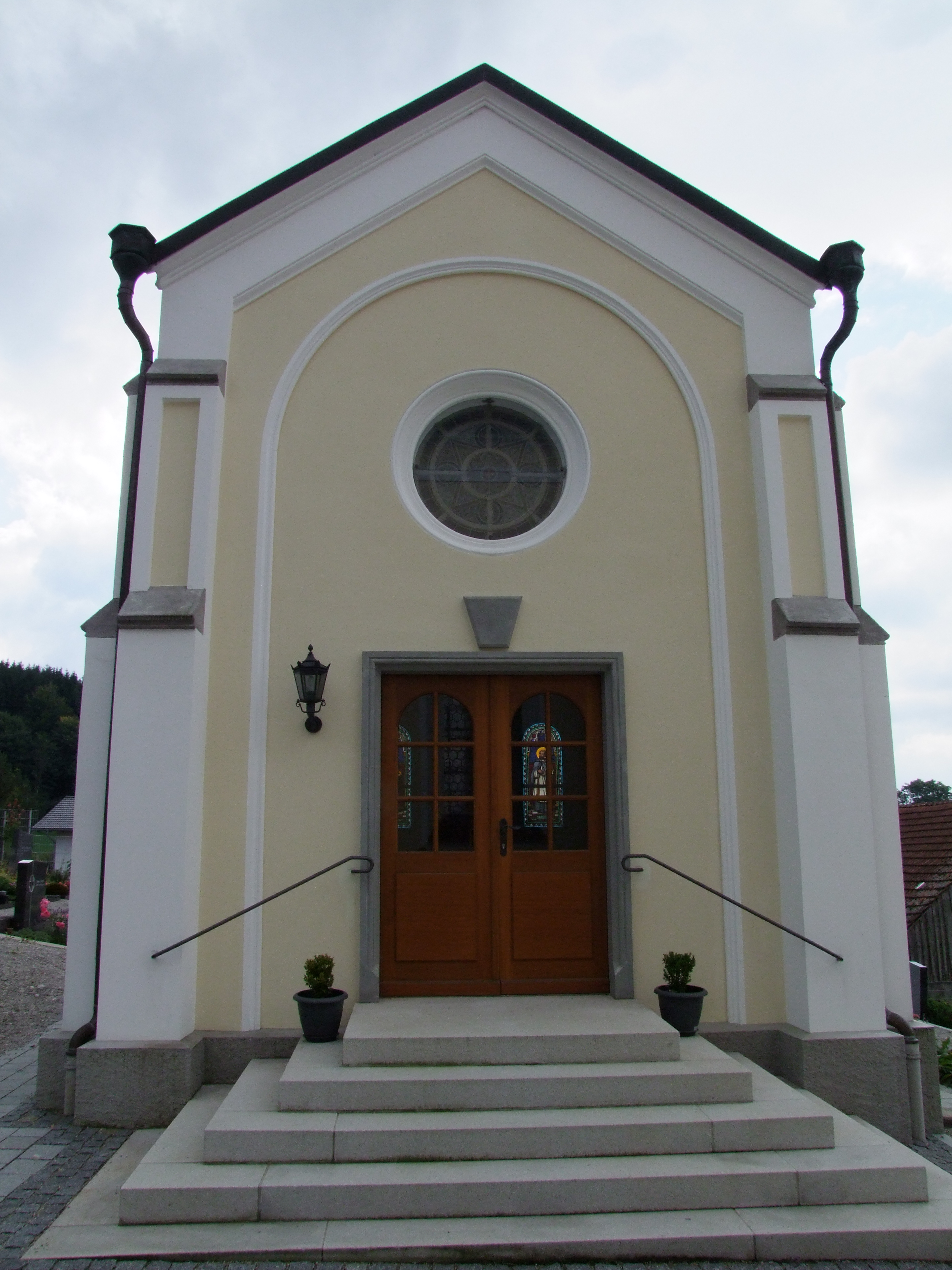 St. Jakobus der Ältere im oberschwäbischen Mindelau, einem Ortsteil der Stadt Mindelheim in Bayern/Schwaben